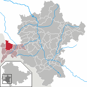 Kaltenwestheim in Thuringia - District Schmalkalden-Meiningen